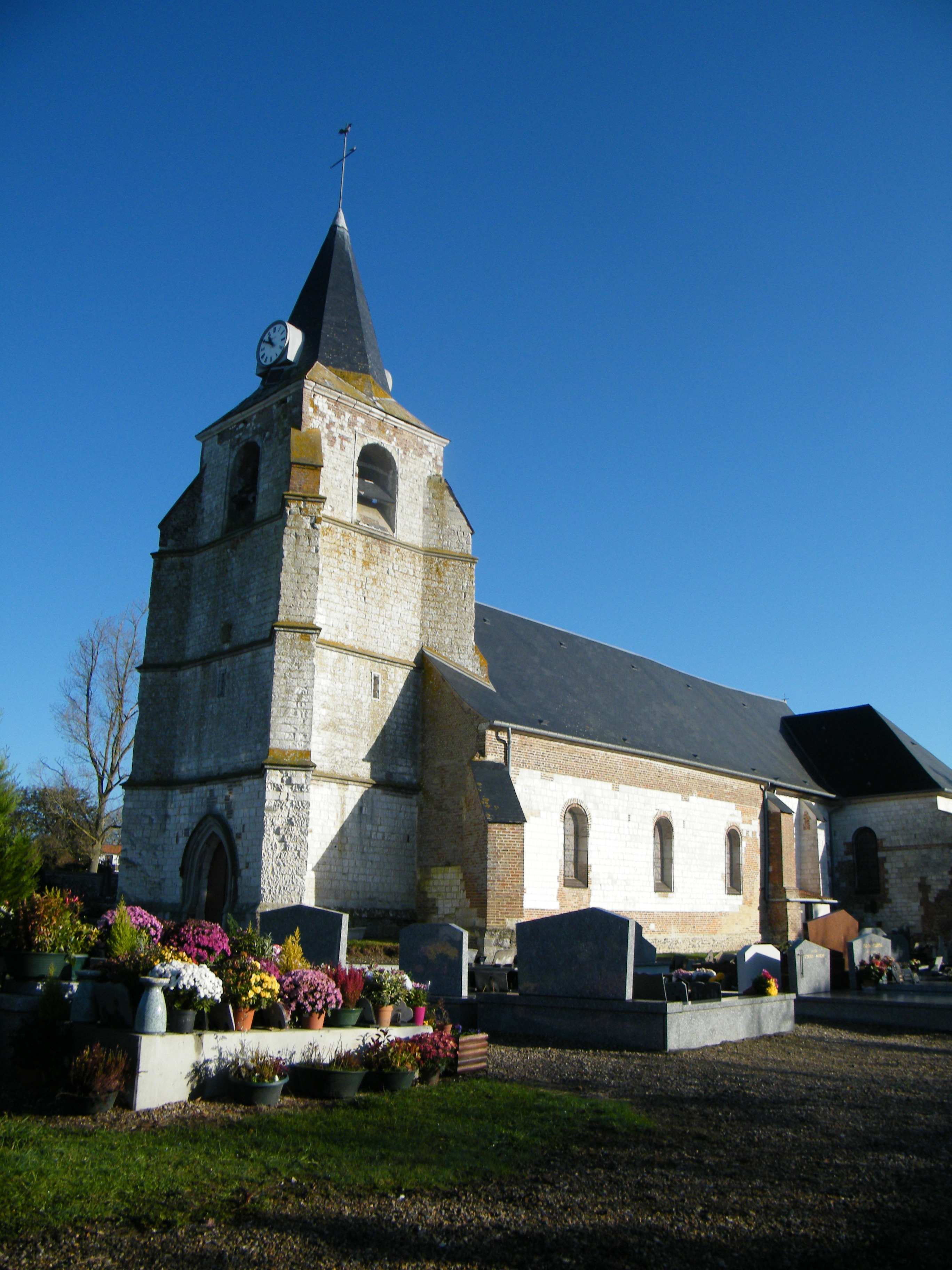 Forest-Montiers, Somme, France, église Saint-Martin.